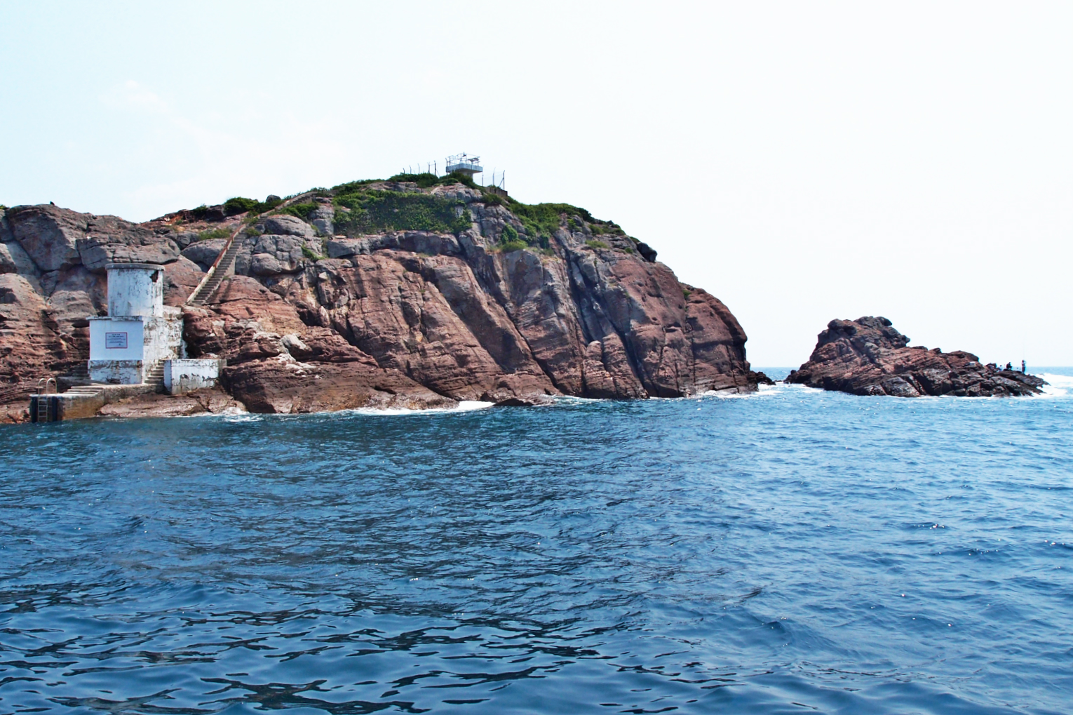 中文（香港）: 「島斷石連」